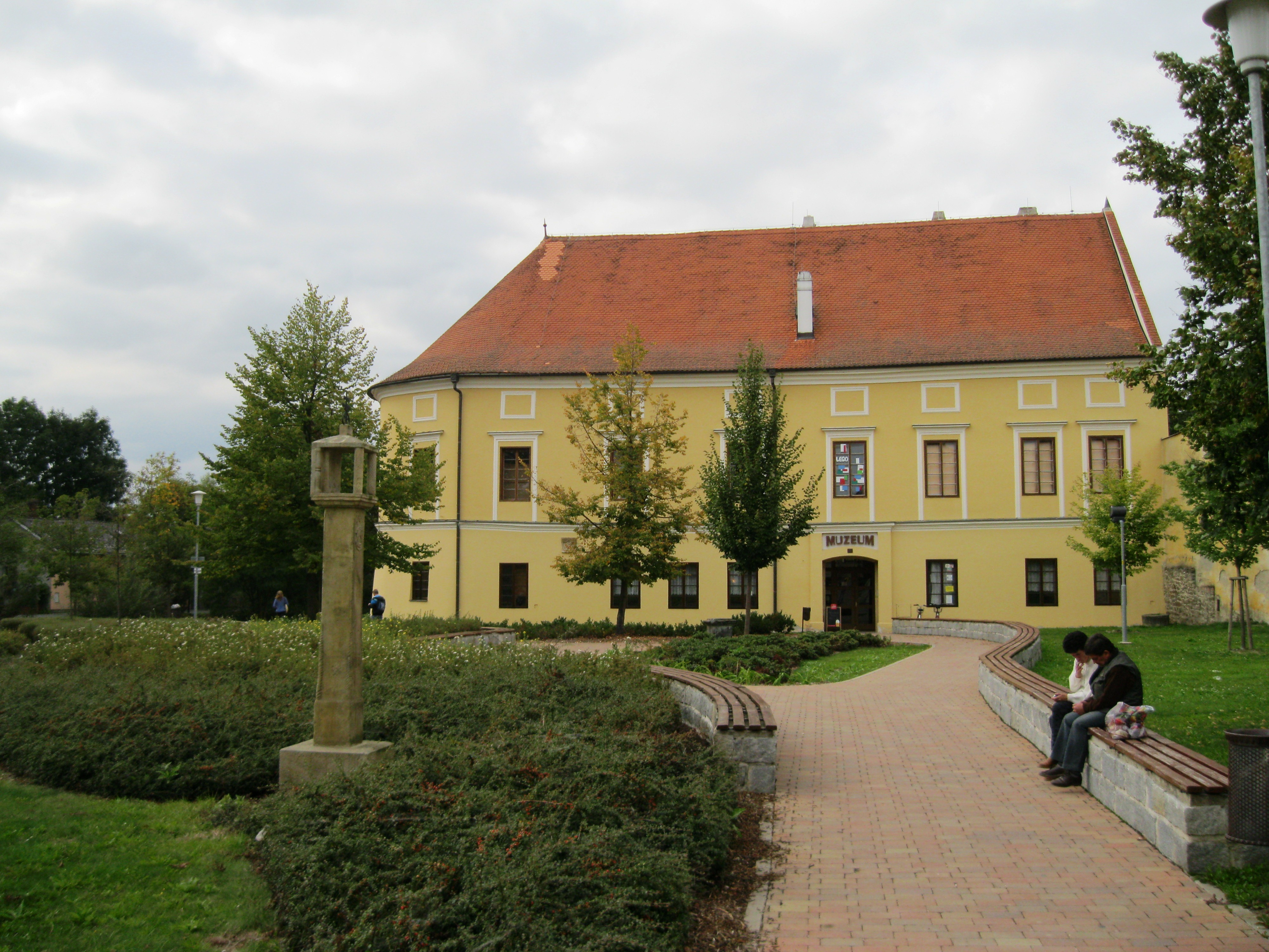 Muzeum - býv. střelnice (Litovel), Smyčkova 795/4, Litovel